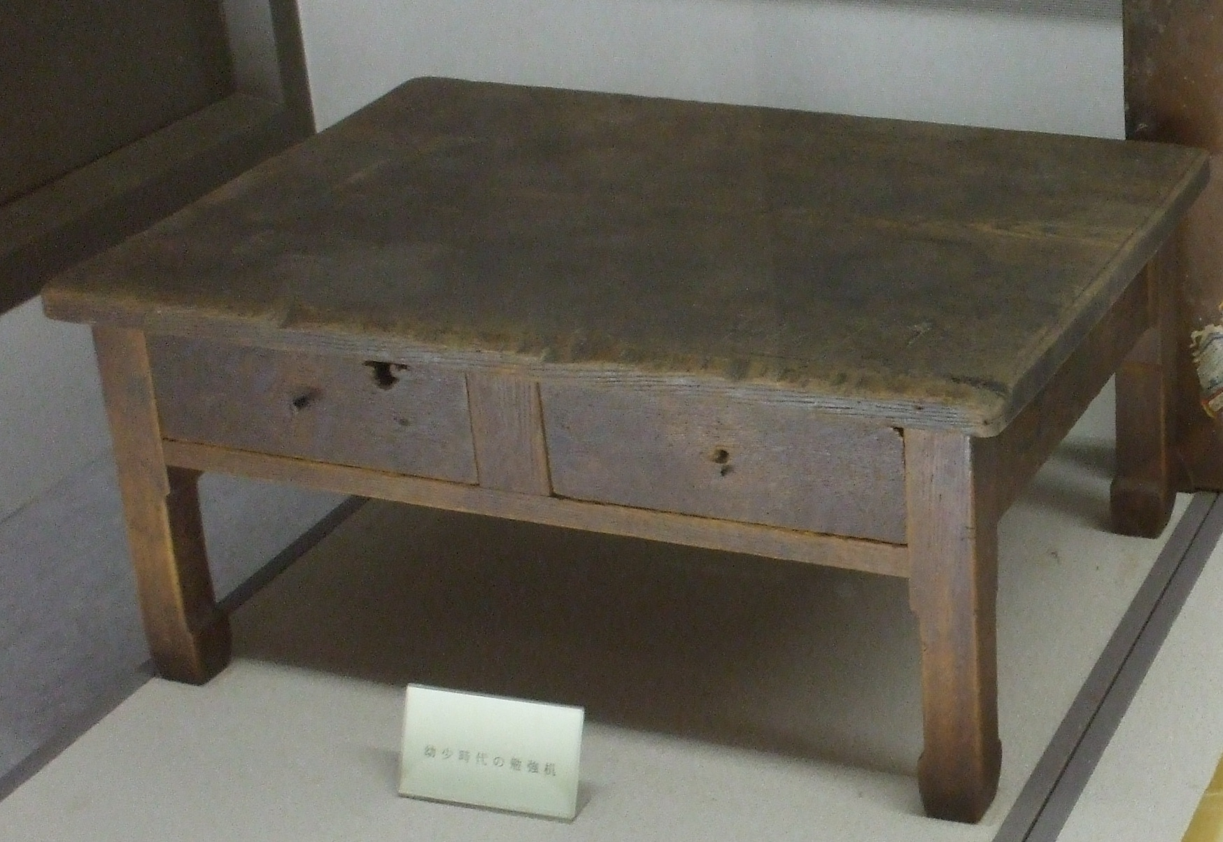 三木武夫が幼少時に使った机。土成歴史館にて撮影。